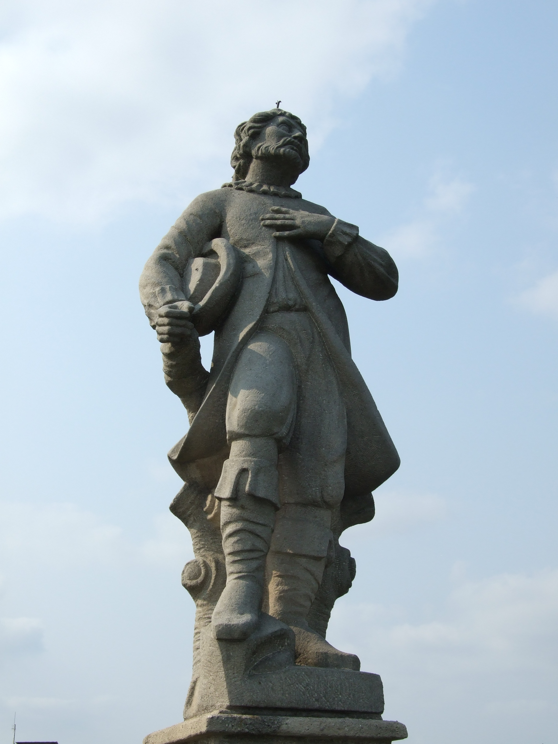 Socha sv. Isidora (Osek), při silnici do Stupna, okres Rokycany